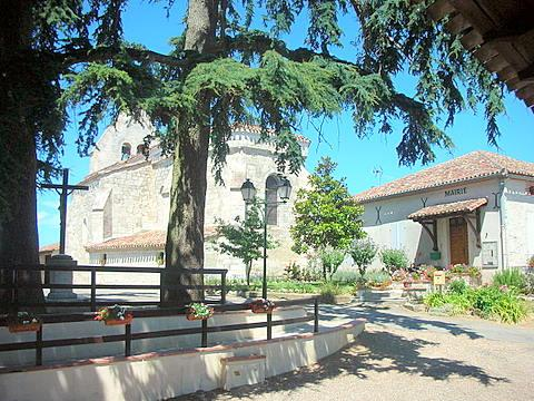 Eglise et Mairie de Saint Vincent Lespinasse